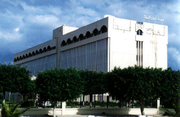 Misura (Libia) - Hotel nella città moderna Licensing Categoria:Misurata